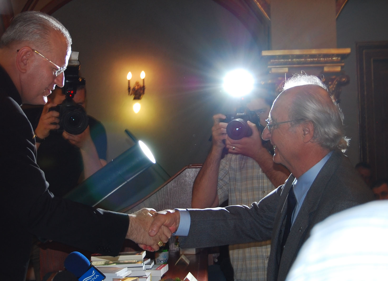 Erdő Péter bíboros átadja a Stephanus-díjat Gánóczy Sándor teológusnak (Budapest)